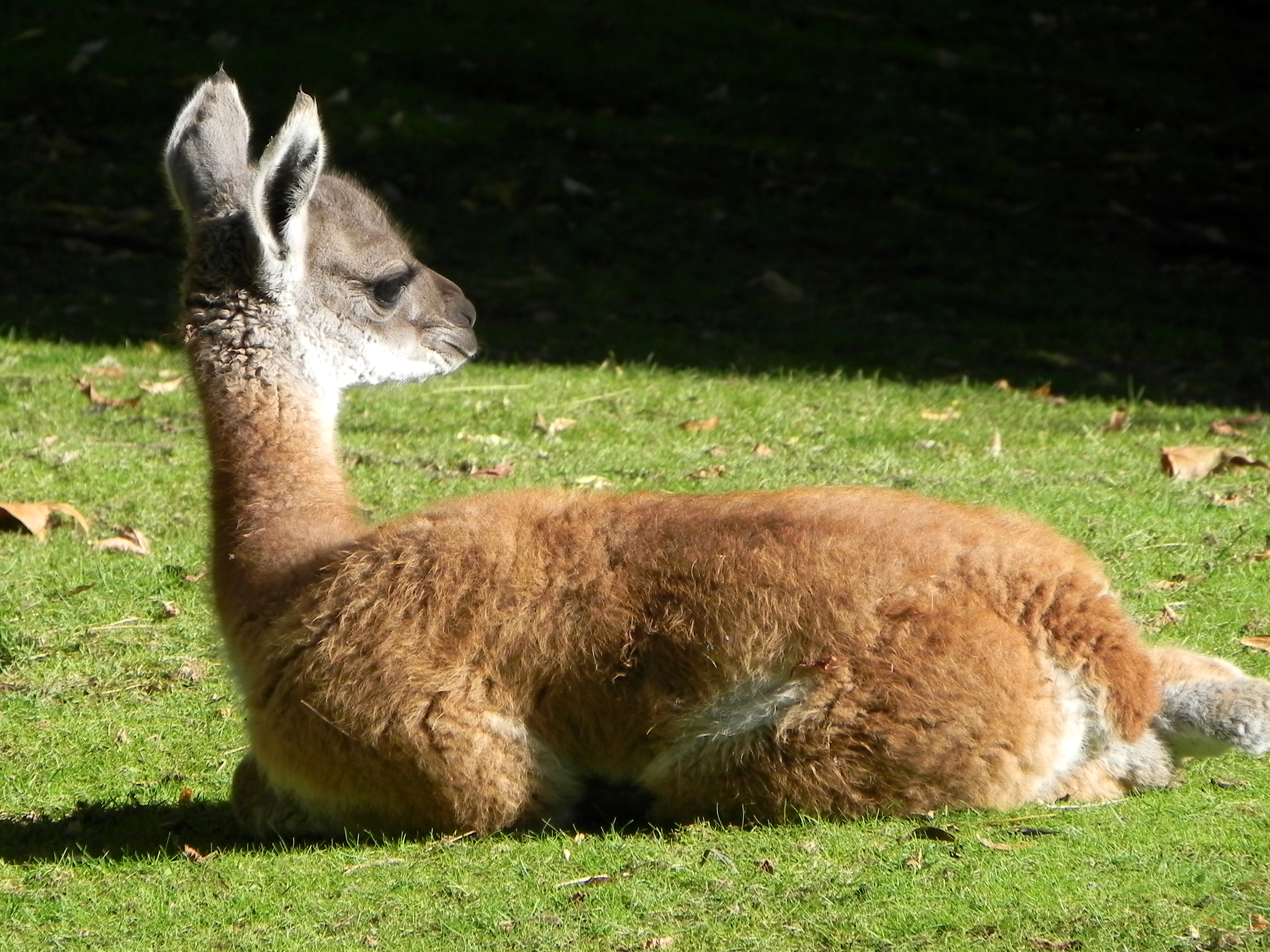 Lama guanicoe juvenile